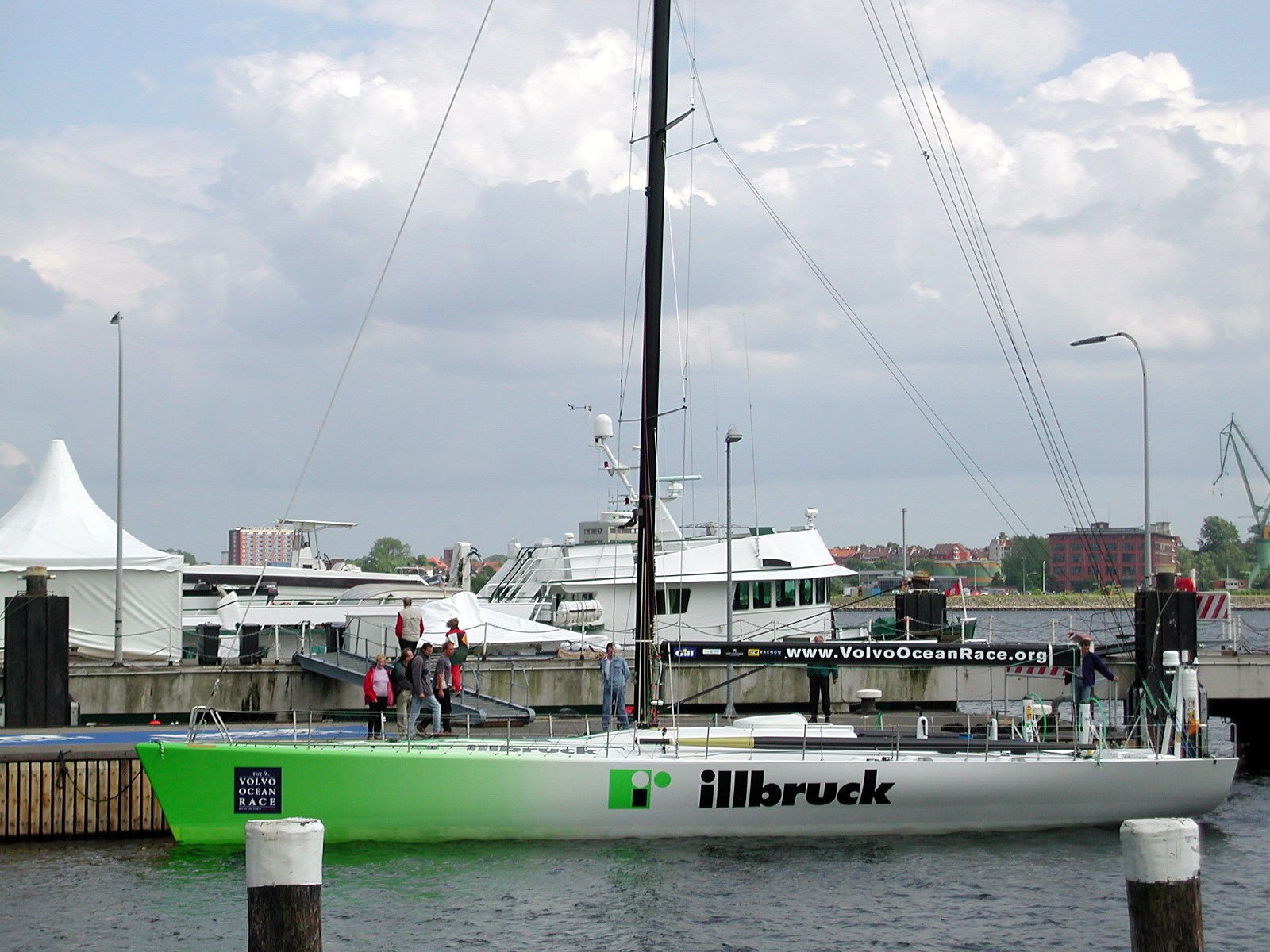 Volvo Ocean Race 2001/2002: Boot des Siegerteams illbruck im Zielhafen Kiel.